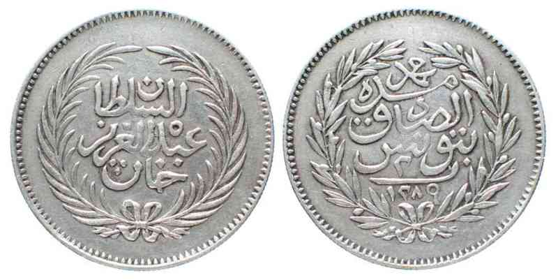 Pièce de 2 Rials Tunisiens (en argent) frappée à Tunis en l'an 1289 AH (1872 AD) durant le reigne de Sadok Bey